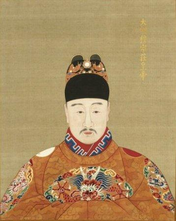 Ming Muzong